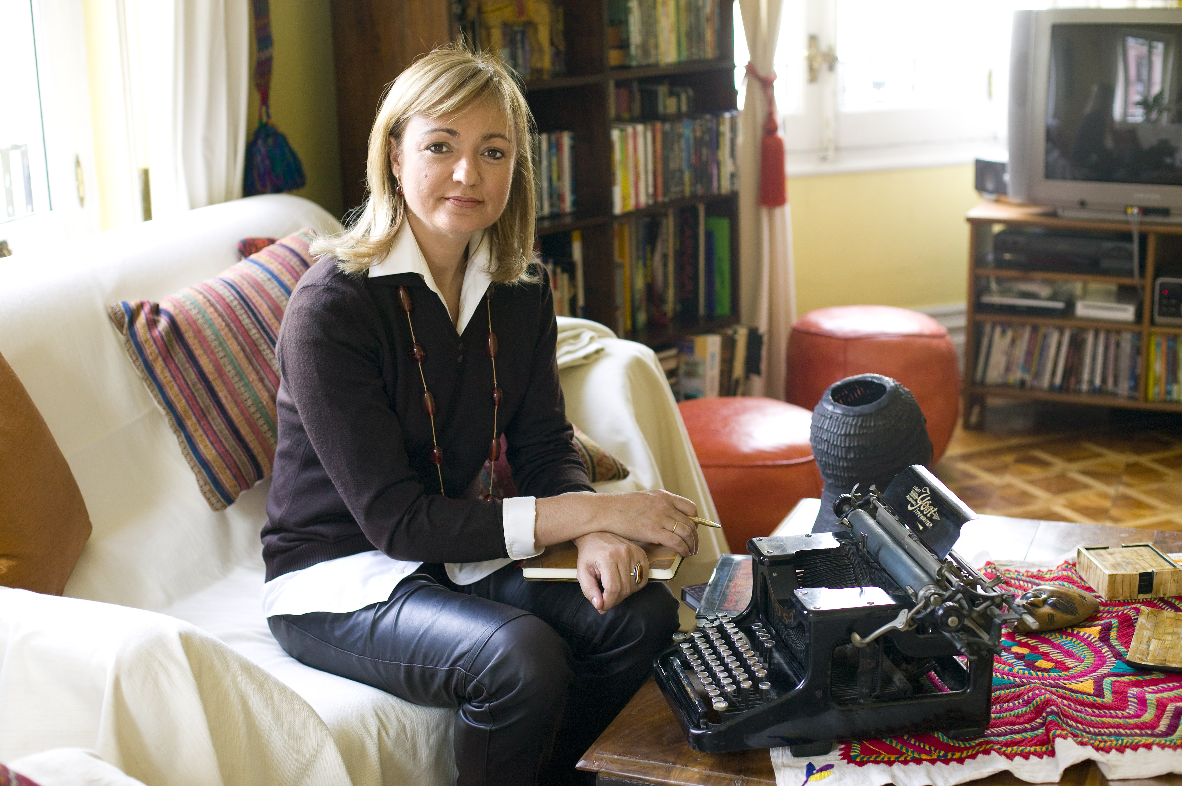 Cristina Morató